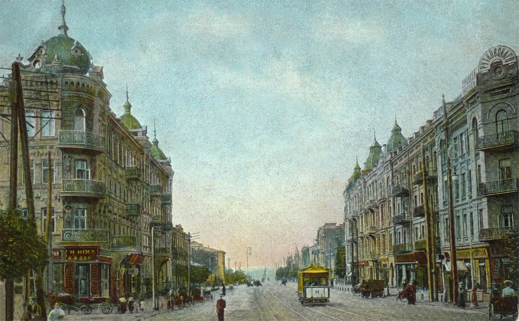 Київ, перехрестя вул. Богдана Хмельницького і вул. Івана Франка